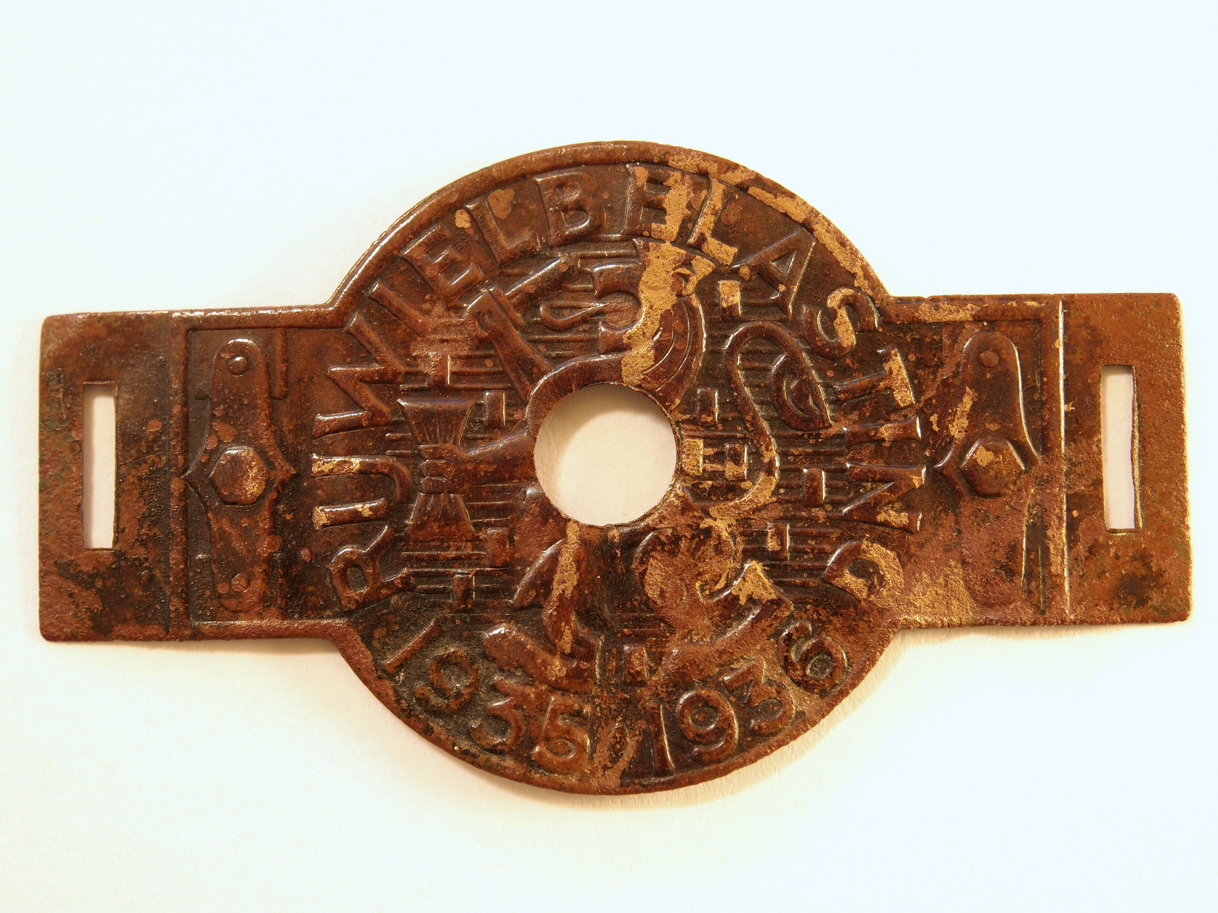 Rijwiel belasting plaatje met gat 1935 - 1936